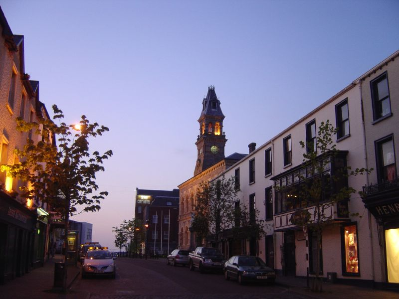 Irsko Sligo